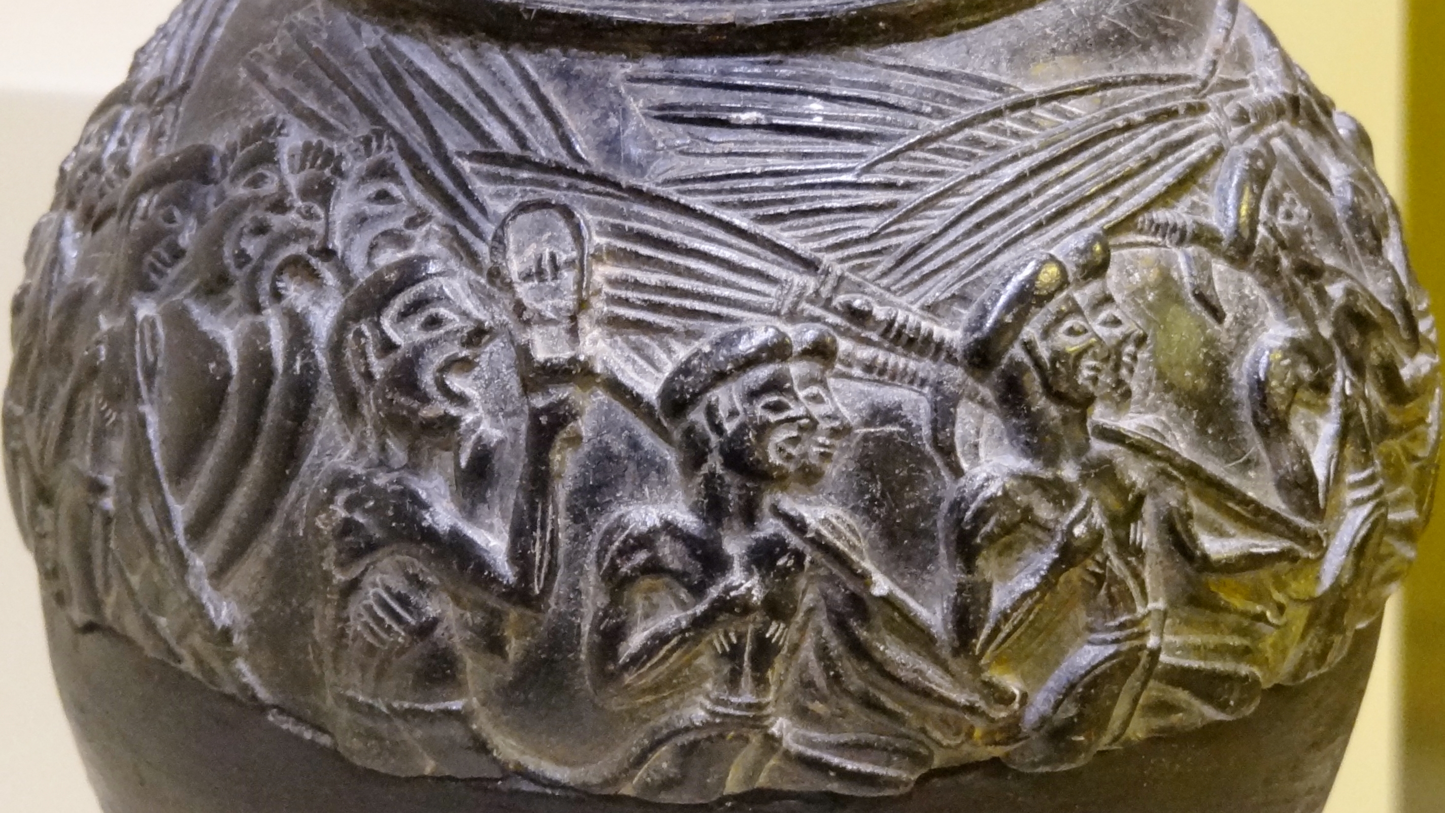 Detail des Reliefs der „Schnittervase“, Reliefrhyton aus Speckstein (Neupalastzeit 1500–1450 v. Chr.) aus Agia Triada, ausgestellt im Archäologischen Museum Iraklio, Kreta, Griechenland